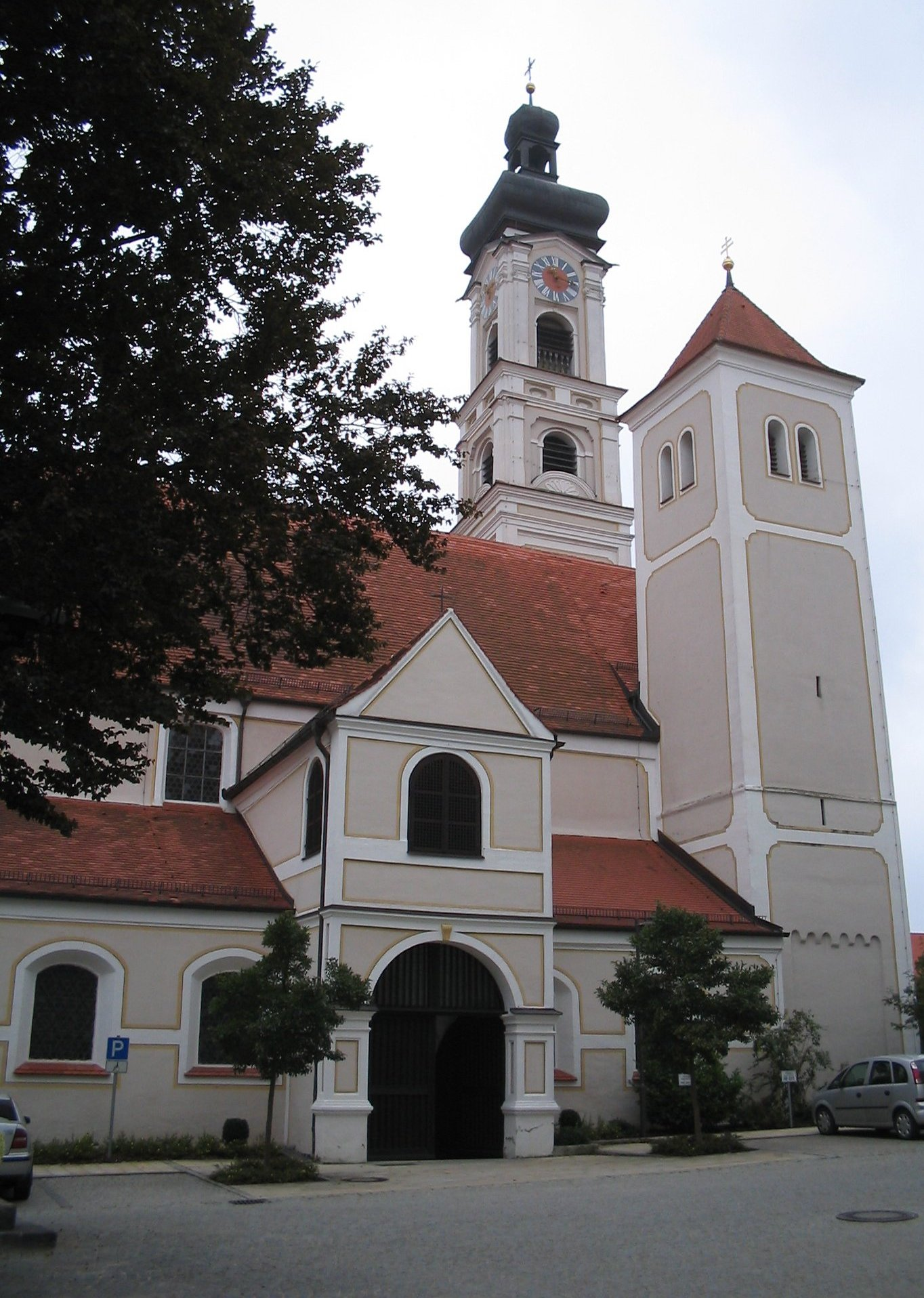 Ehemalige Kloster- und jetzige Stadtpfarrkirche in Geisenfeld